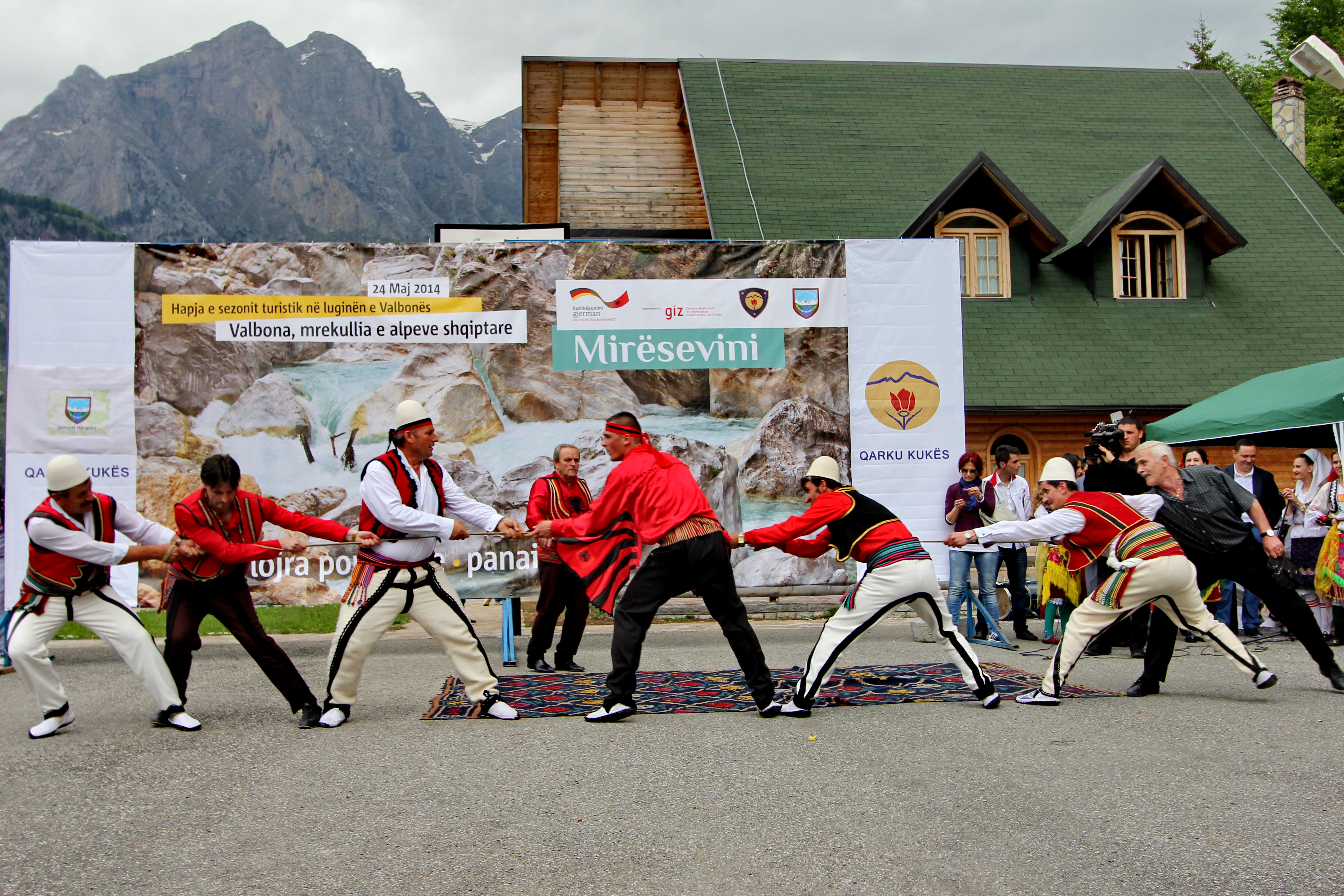 Lojra Popullore - Valbonë